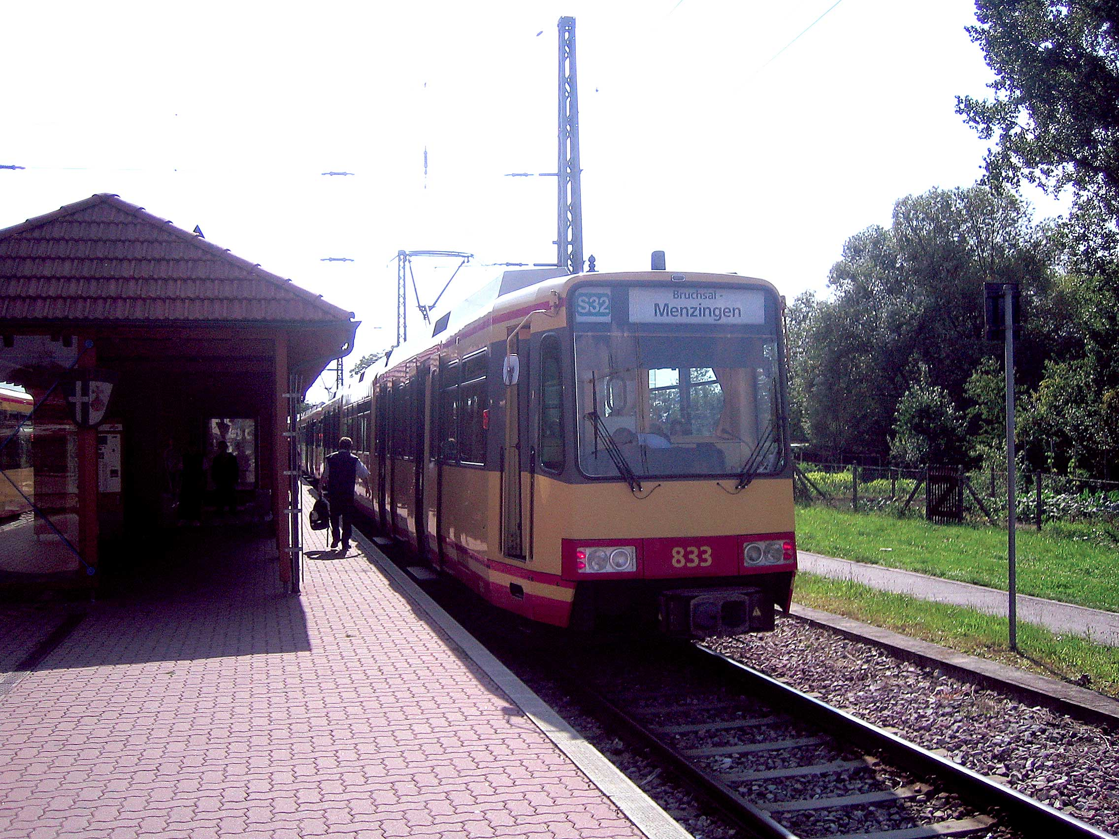 basiert auf Bild:Ubstadtort.JPG, entsprechend der Vorlage GFDL Bf. Ubstadt Ort, selbst fotografiert von Benutzer:Antifaschist 666